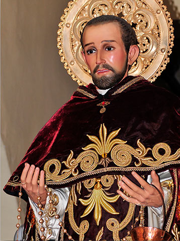 San Juan Macias